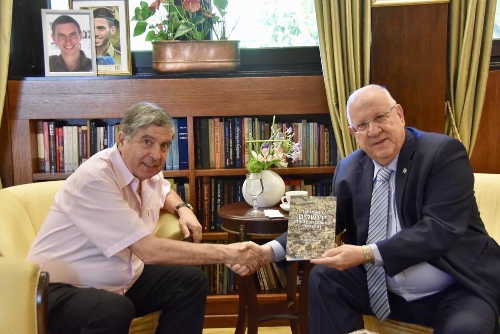 דוקטור ברקוביץ ביחד עם הנשיא ריבלין